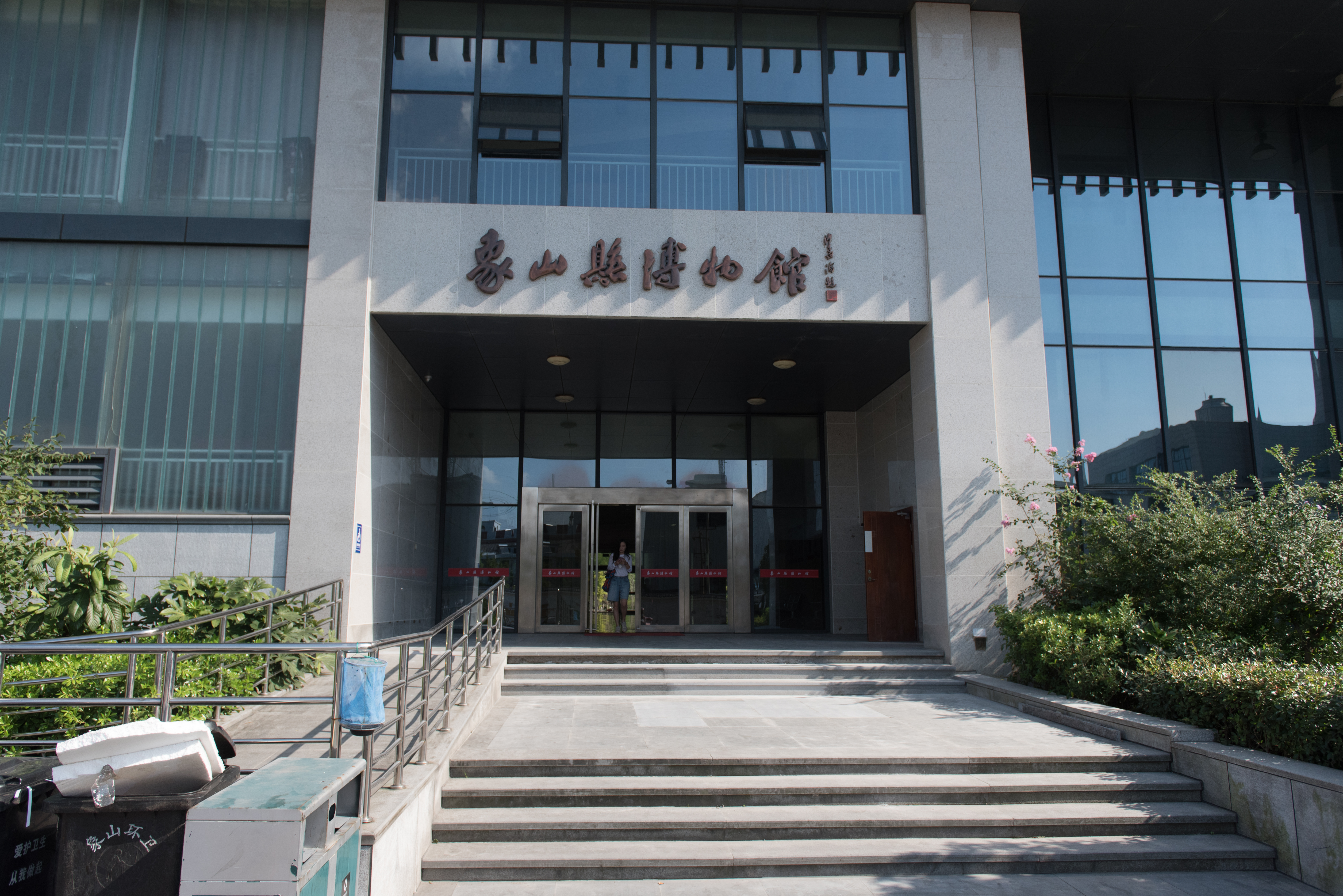 象山县博物馆入口